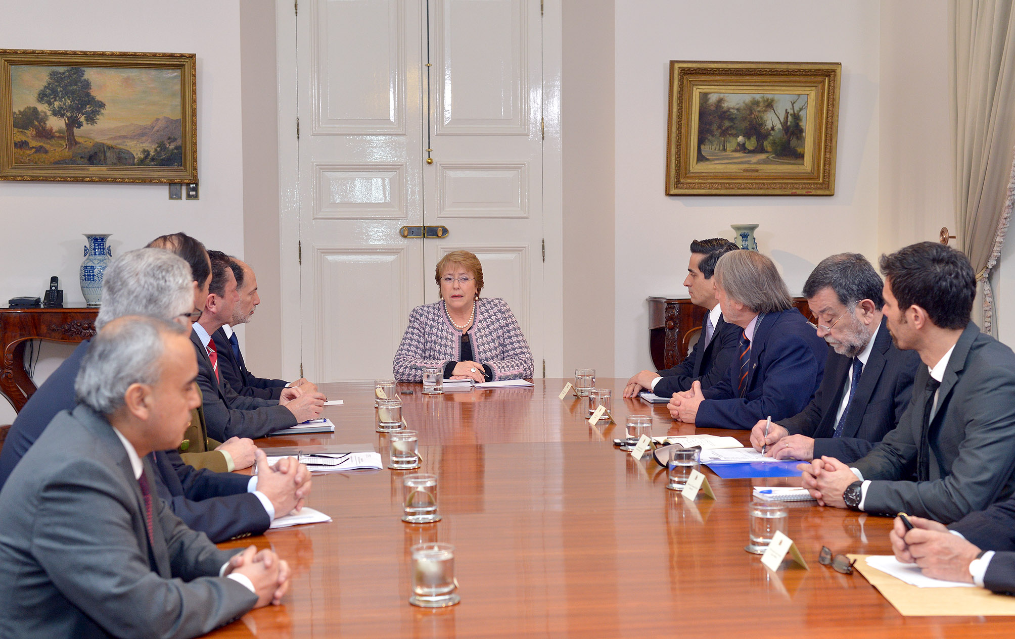 La Presidenta de la República, Michelle Bachelet, encabezó el Consejo Operativo de Seguridad, convocado ante el atentado en el Subcentro de la Estación Escuela Militar.